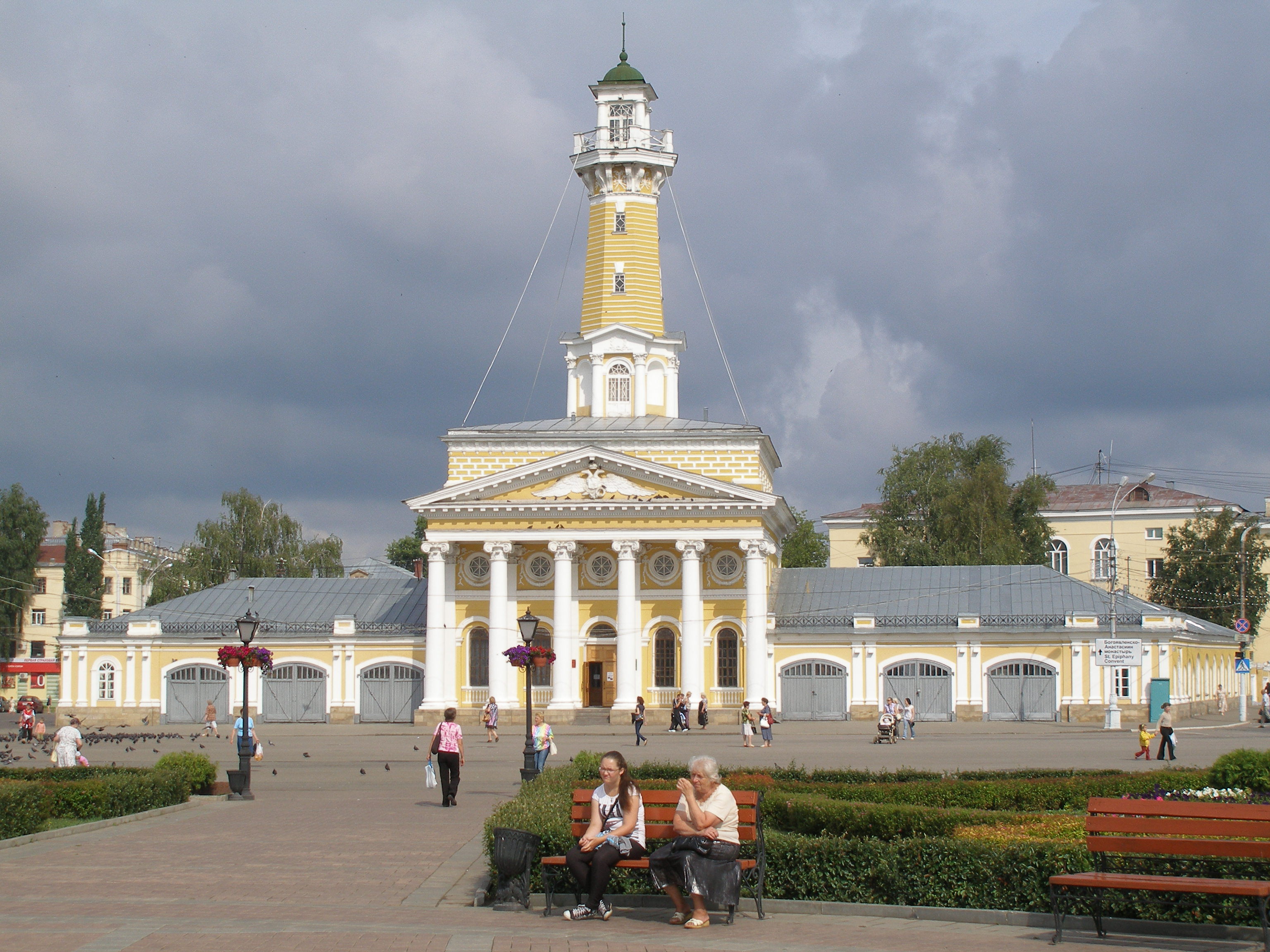 Пожарная каланча на Сусанинской площади в Костроме (построена в 1824—1827 годах)